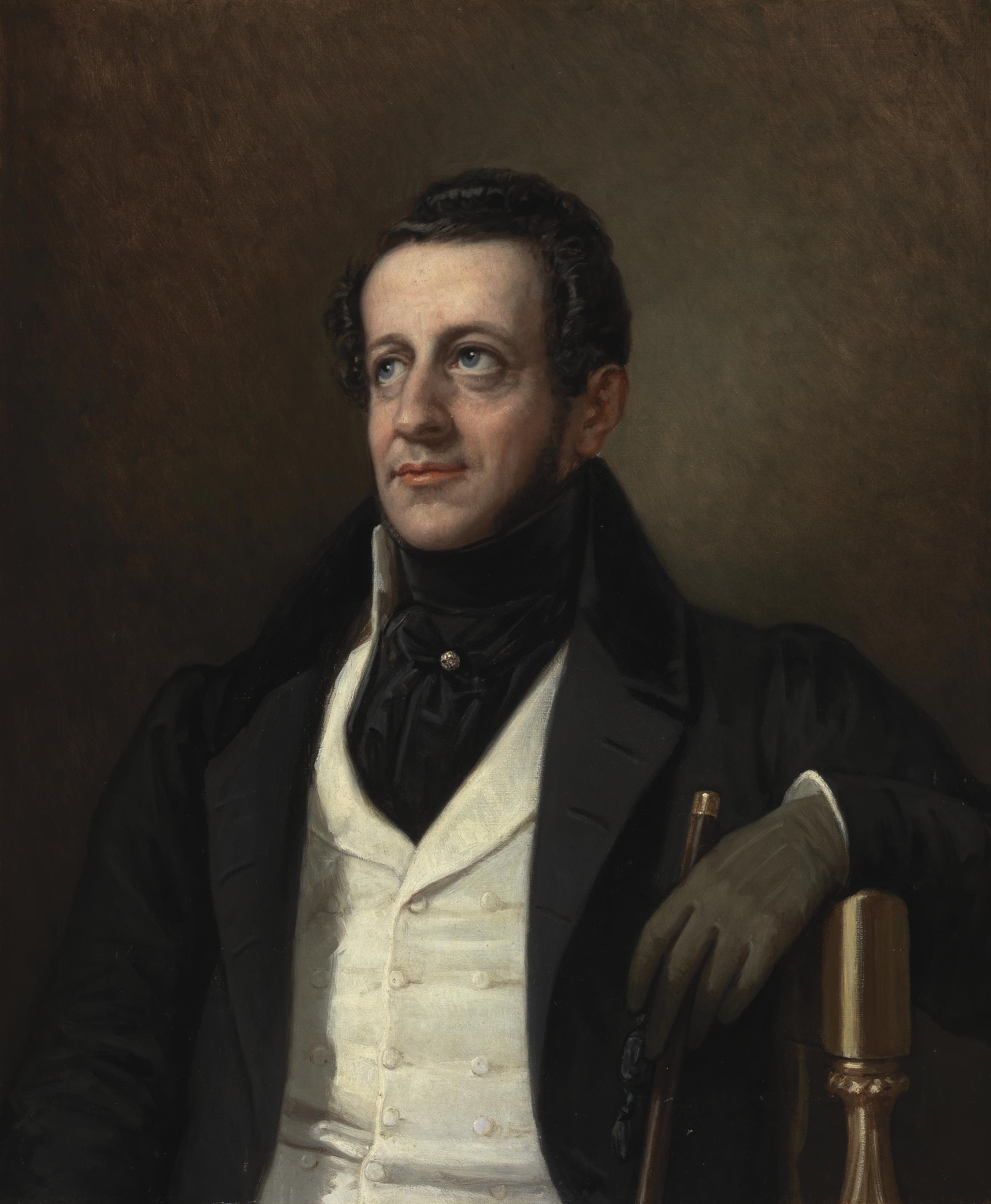 Retrato del escritor, militar y político Ángel de Saavedra (1791-1865), duque de Rivas y grande de España. Su obra literaria más conocida es Don Álvaro o la fuerza del sino.